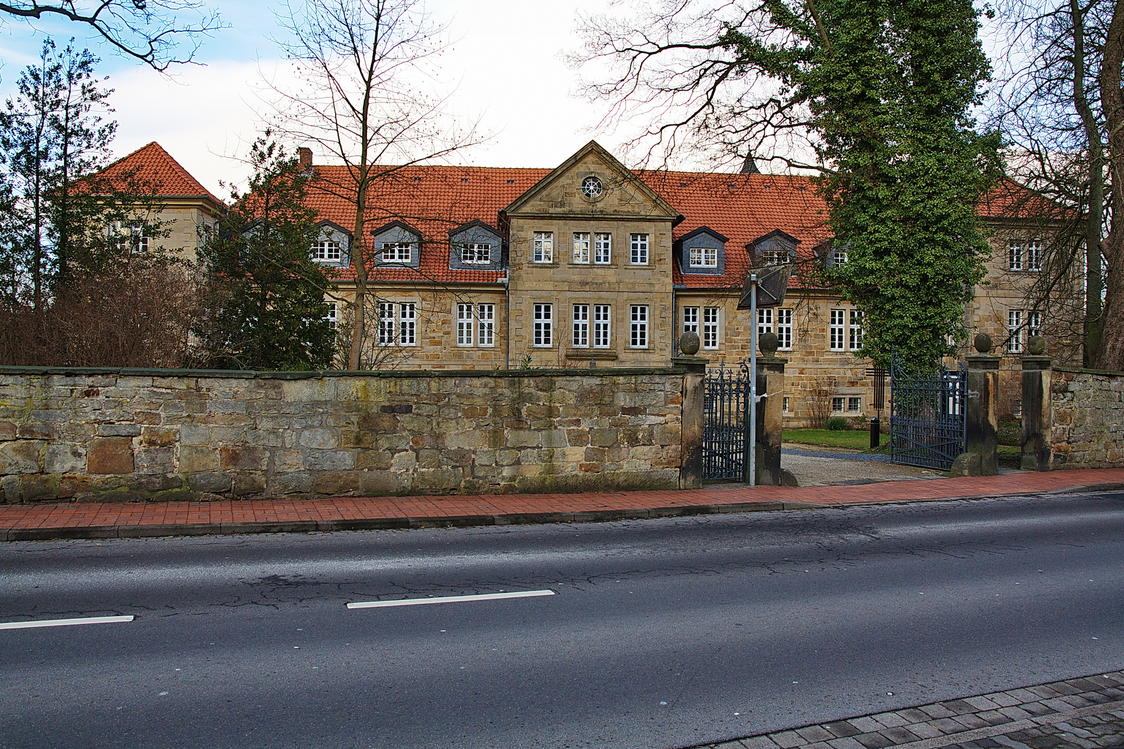 Kloster Barsinghausen von 1193, Niedersachsen, Deutschland